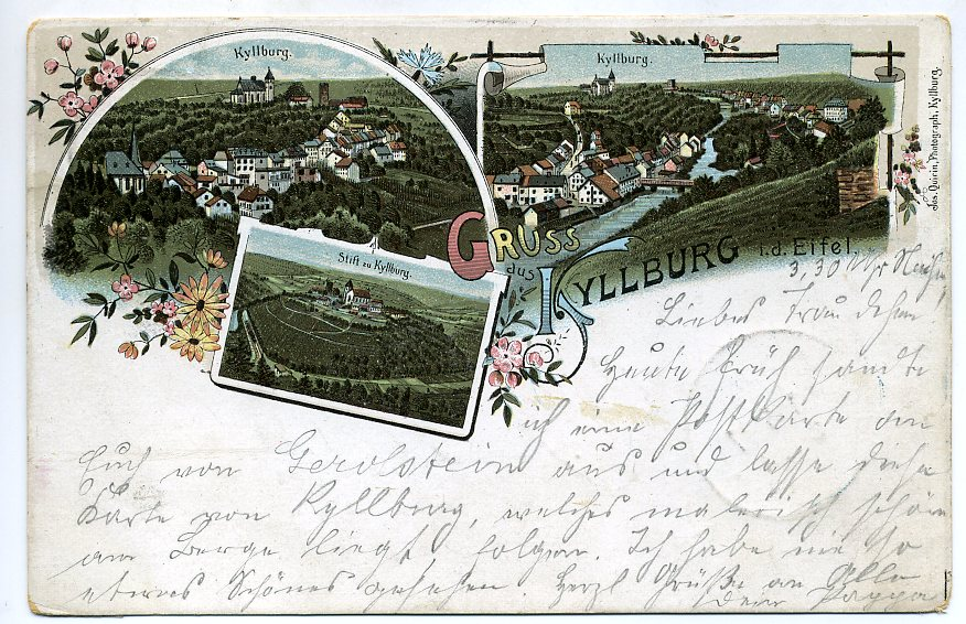 Gruss aus Kyllburg i.d. Eifel 1897 Stift zu Kyllburg